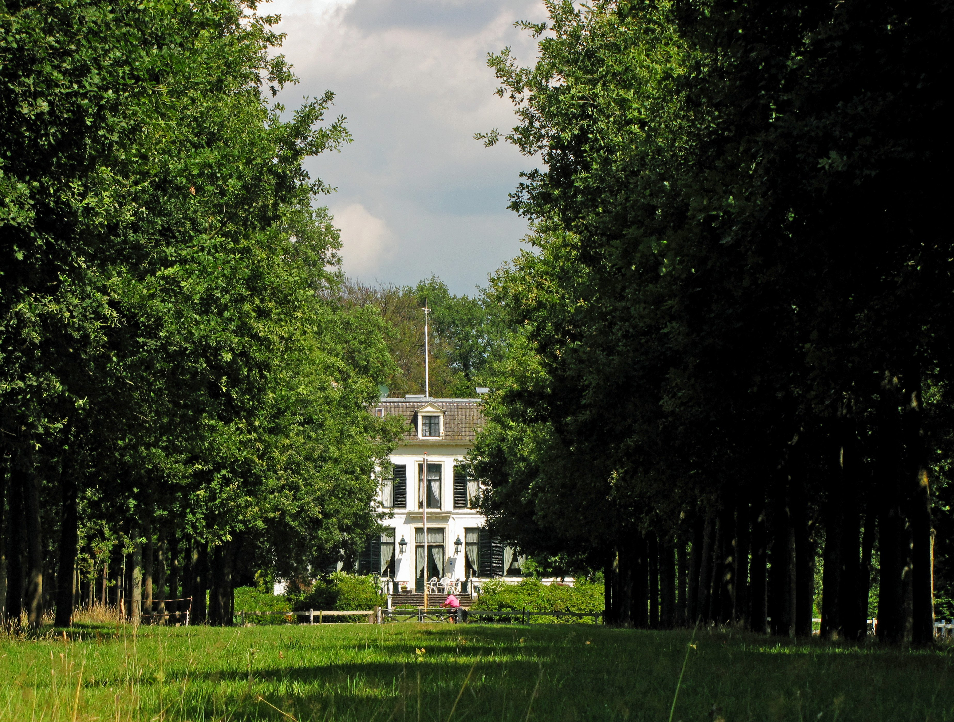 Zichtlaan waarvan de bomen opgekroond zouden mogen worden.